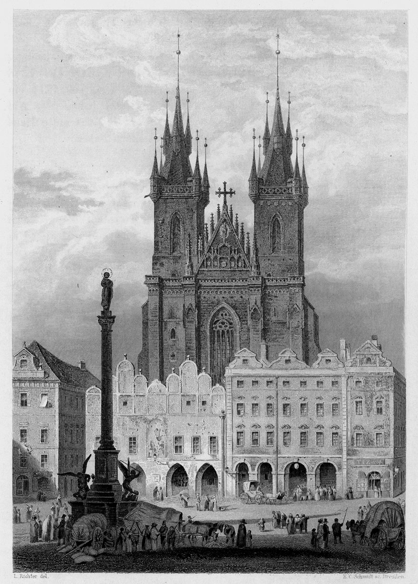 Prag, Teynkirche und Altstädter Ring (mit Mariensäule), Stahlstich nach Ludwig Richter: Kirche und Mariensäule, aus: Karl Herlossohn: Wanderungen durch das Riesengebirge und die Grafschaft Glatz (Das malerische und romantische Deutschland, Bd. 6), 1841